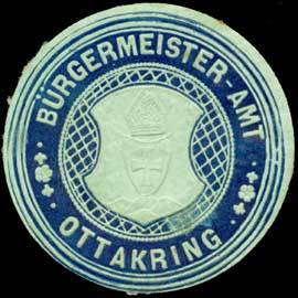 Sealing stamp Title: Bürgermeister-Amt Ottakring Description: dunkelblau, graugrün, geprägt Place: Ottakring size: 4 cm